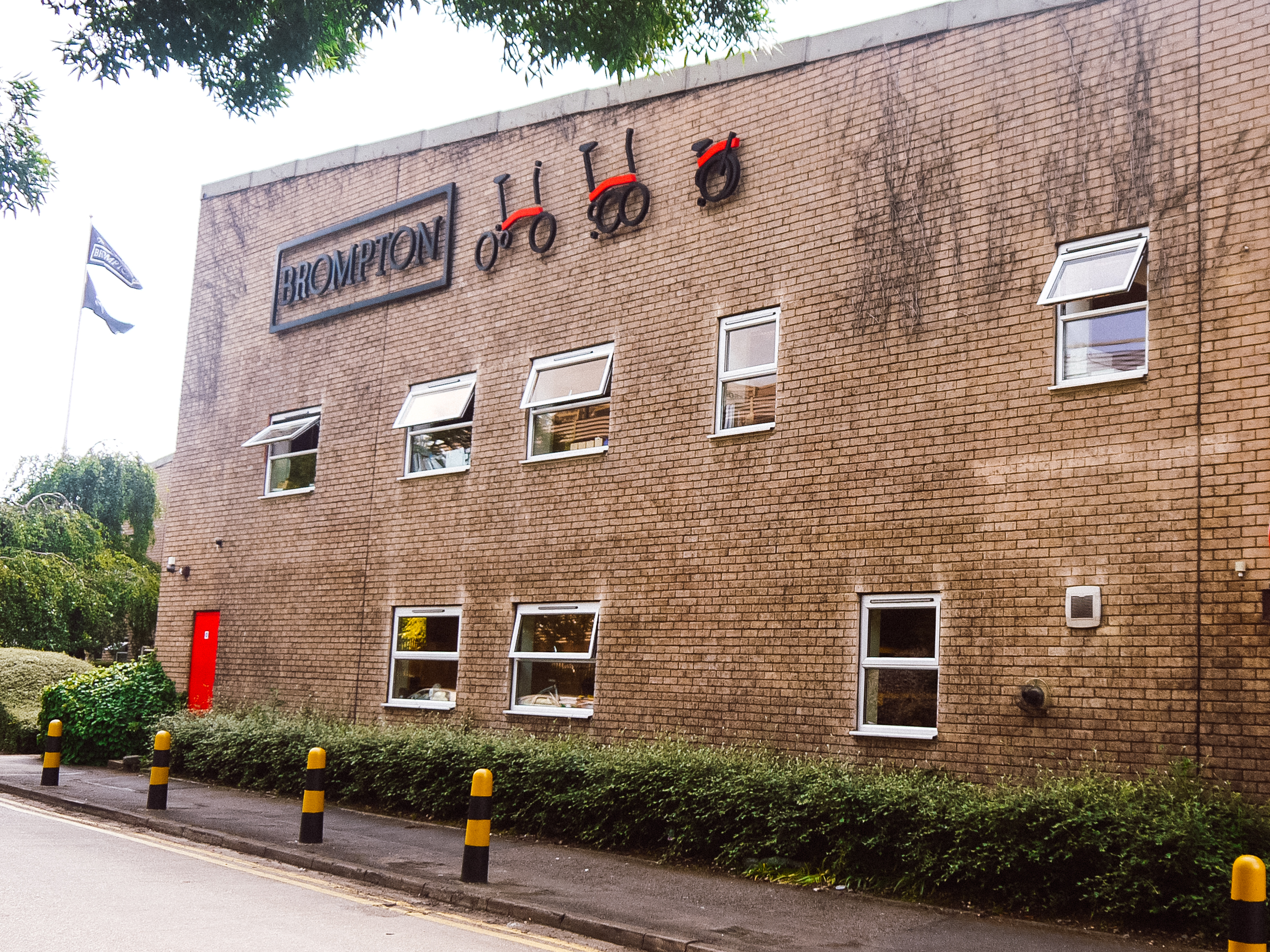 Firmenzentrale Brompton, London, Chiswick